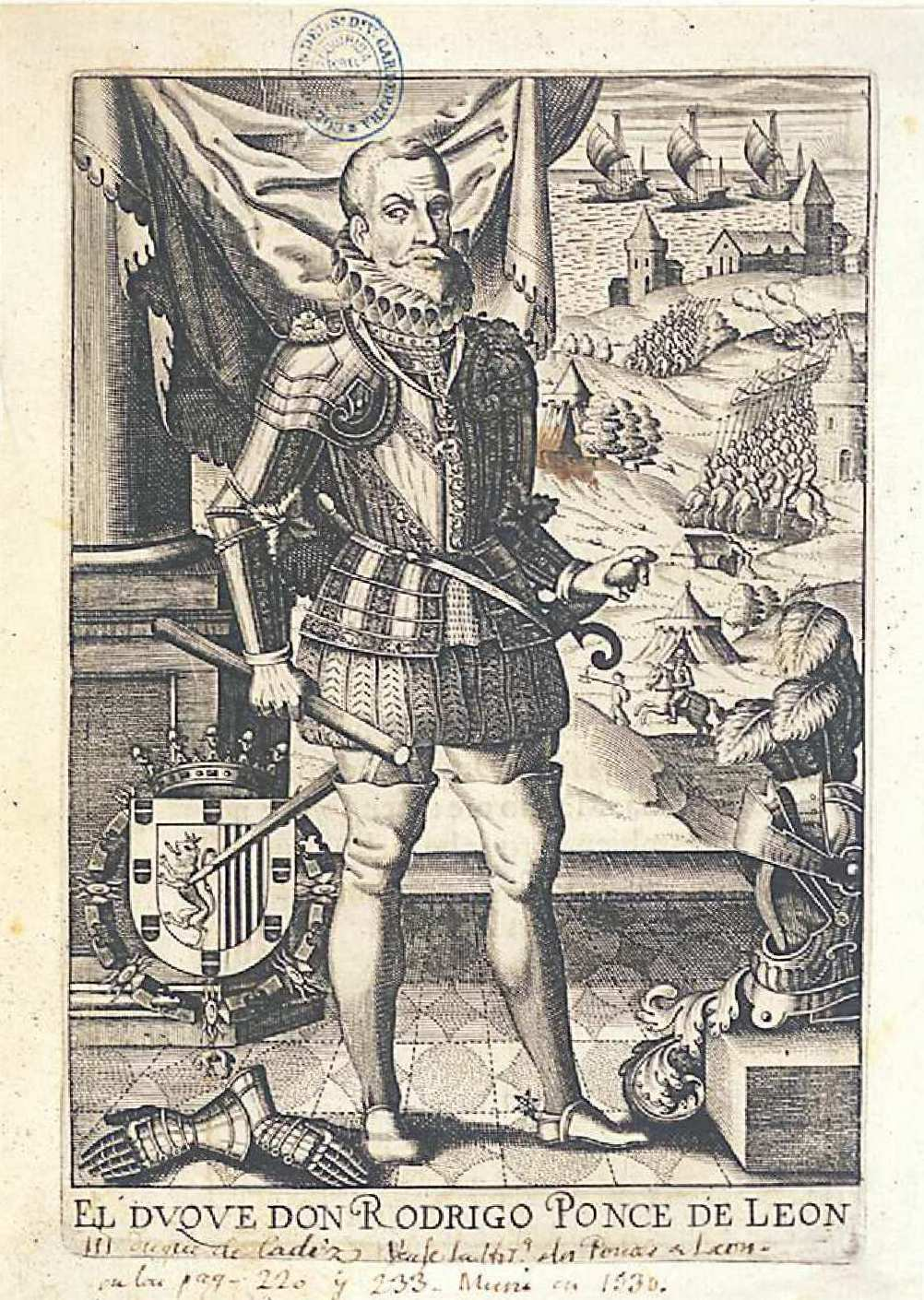 El duque don Rodrigo Ponce de León, III duque de Cádiz. Ilustración de Crónica de la excelentissima casa de los Ponces de León, de Pedro Salazar y Mendoza. Toledo, 1620, obra en la que alguna estampa aparece firmada por Antón Pizarro. Biblioteca Nacional de España